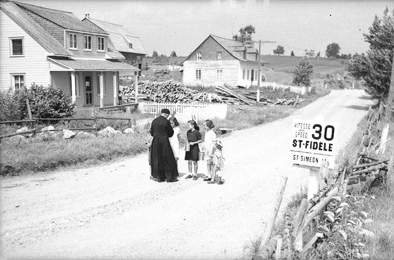 Le curé de Saint-Fidèle, comté de Charlevoix, parlant aux enfants